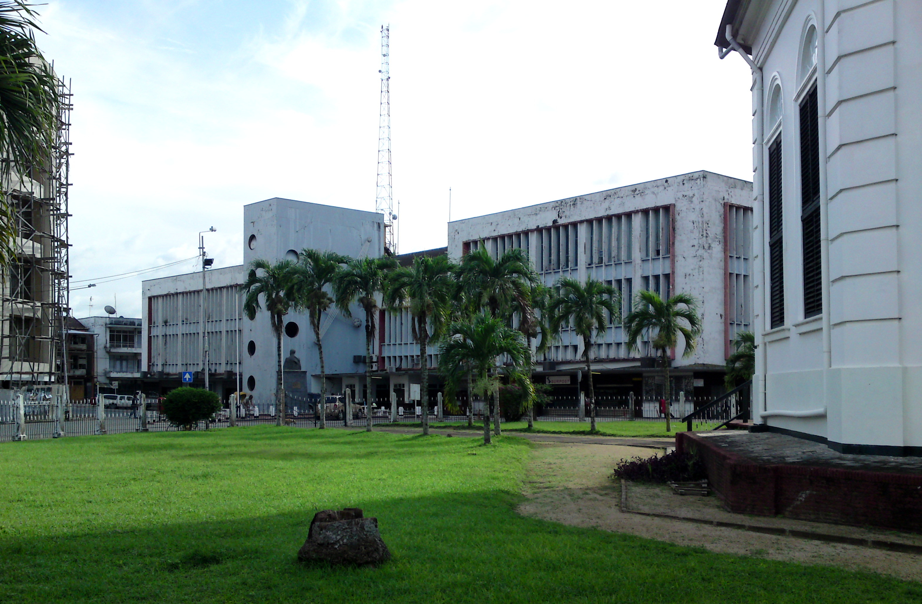 Paramaribo Post Office